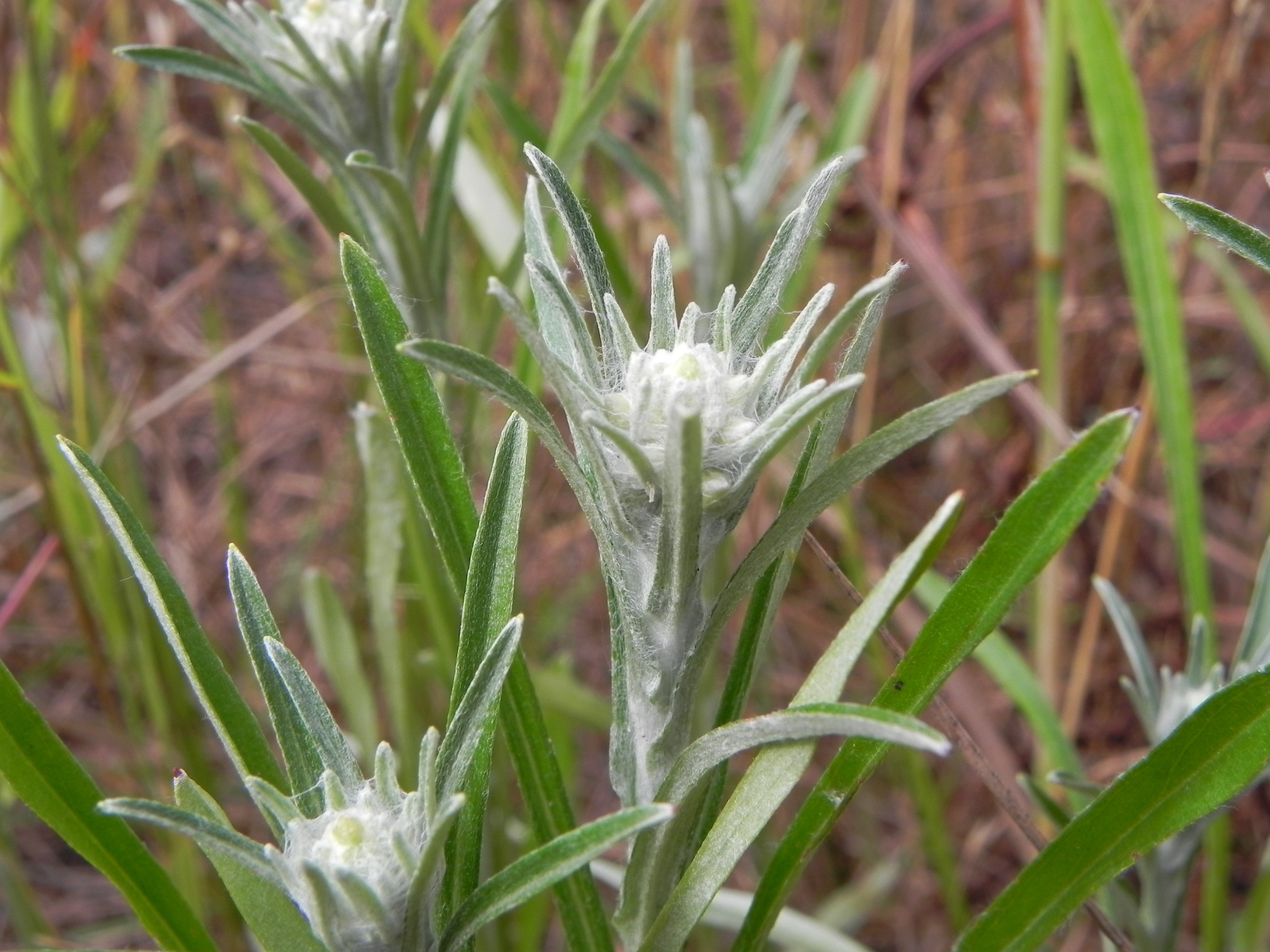 Wald-Ruhrkraut (Gnaphalium sylvaticum) im Naturpark Südheide